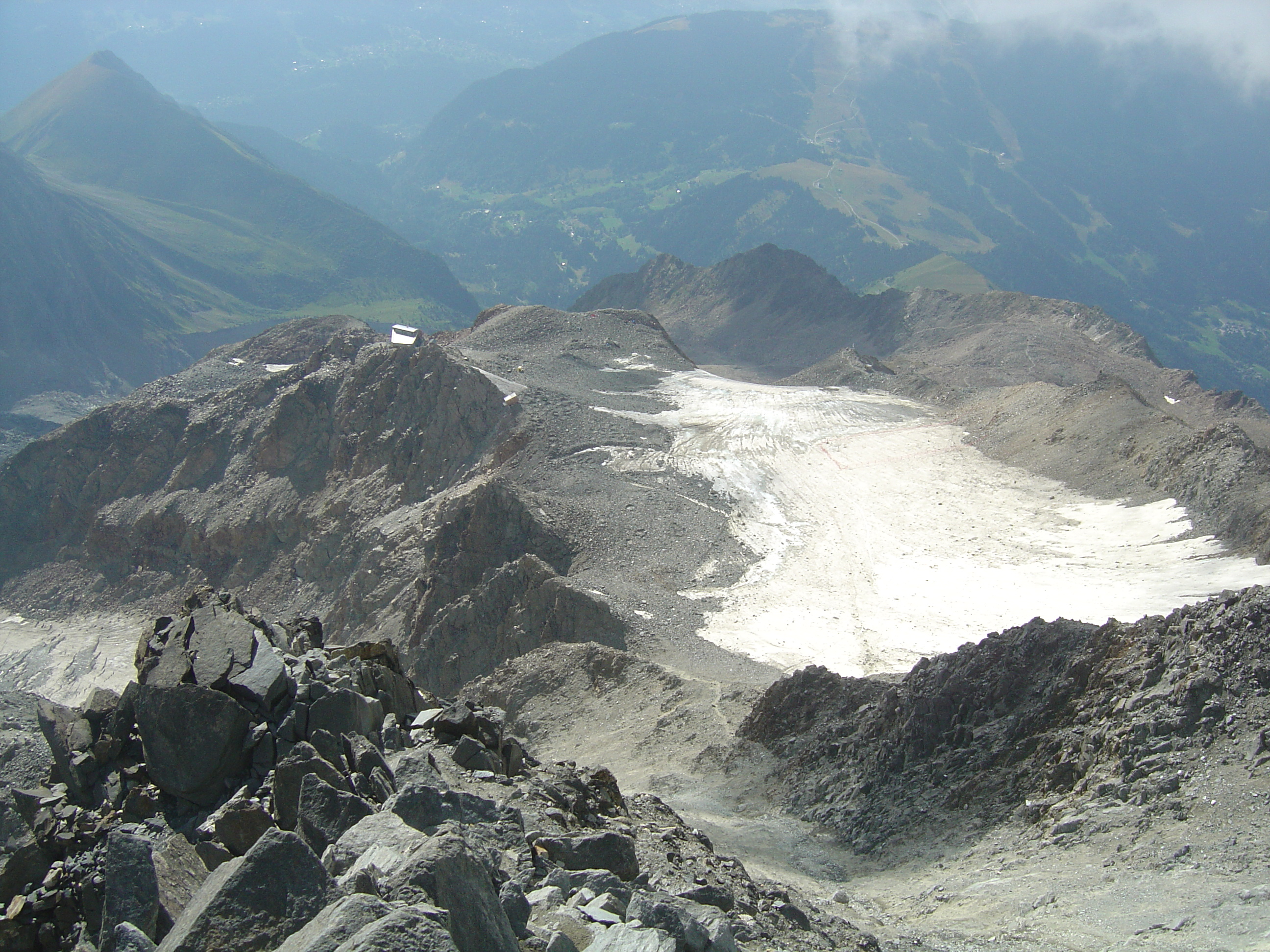 Vue plongeante depuis le couloir du Goûter dans l'ascension du mont Blanc. On voit plus bas le refuge de Tête Rousse